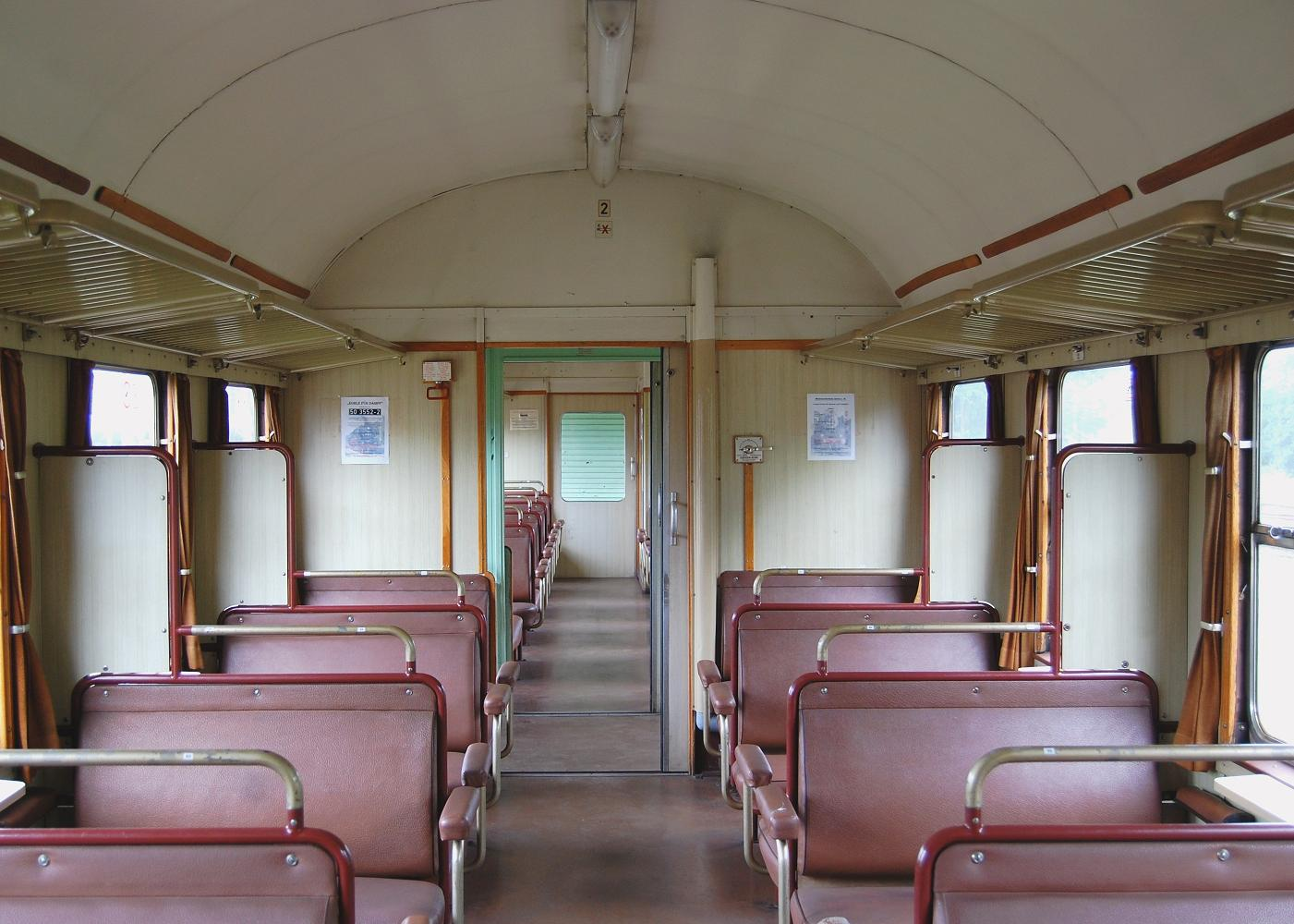 Innenansicht eines Umbauwagens der Gattung B4yg (75 911) der Museumseisenbahn Hanau e. V.